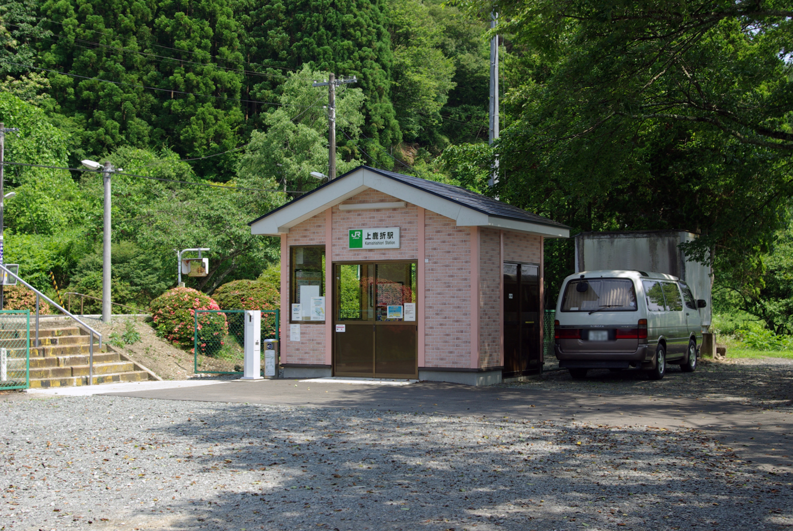 JR大船渡線上鹿折駅